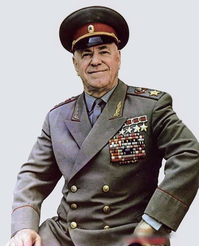 Георгий Константинович Жуков (1896 — 1974) — советский полководец, Маршал Советского Союза